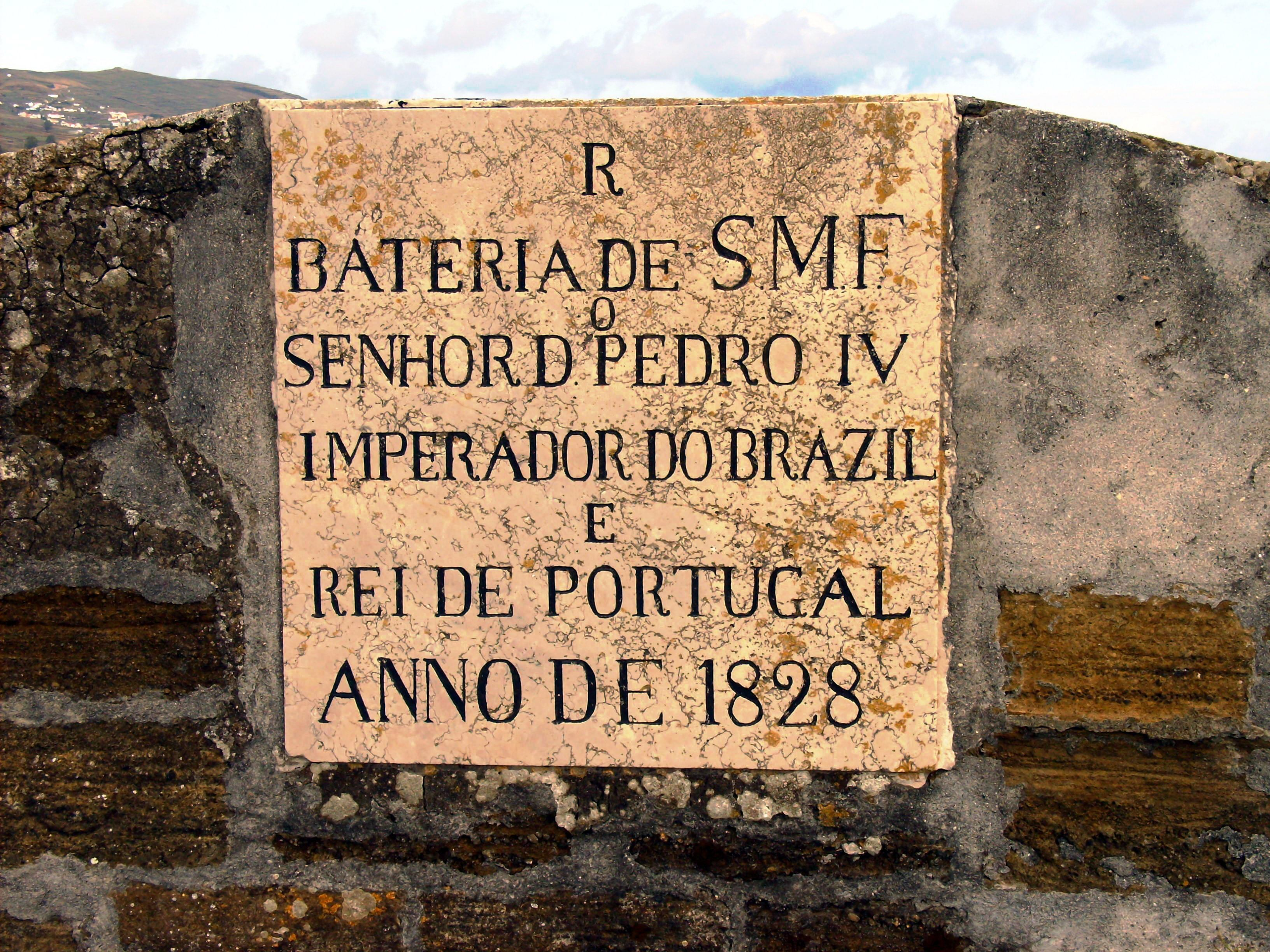 Fortaleza de São João Baptista do Monte Brasil, Angra do Heroísmo, ilha Terceira, Açores: Bateria de D. Pedro IV.